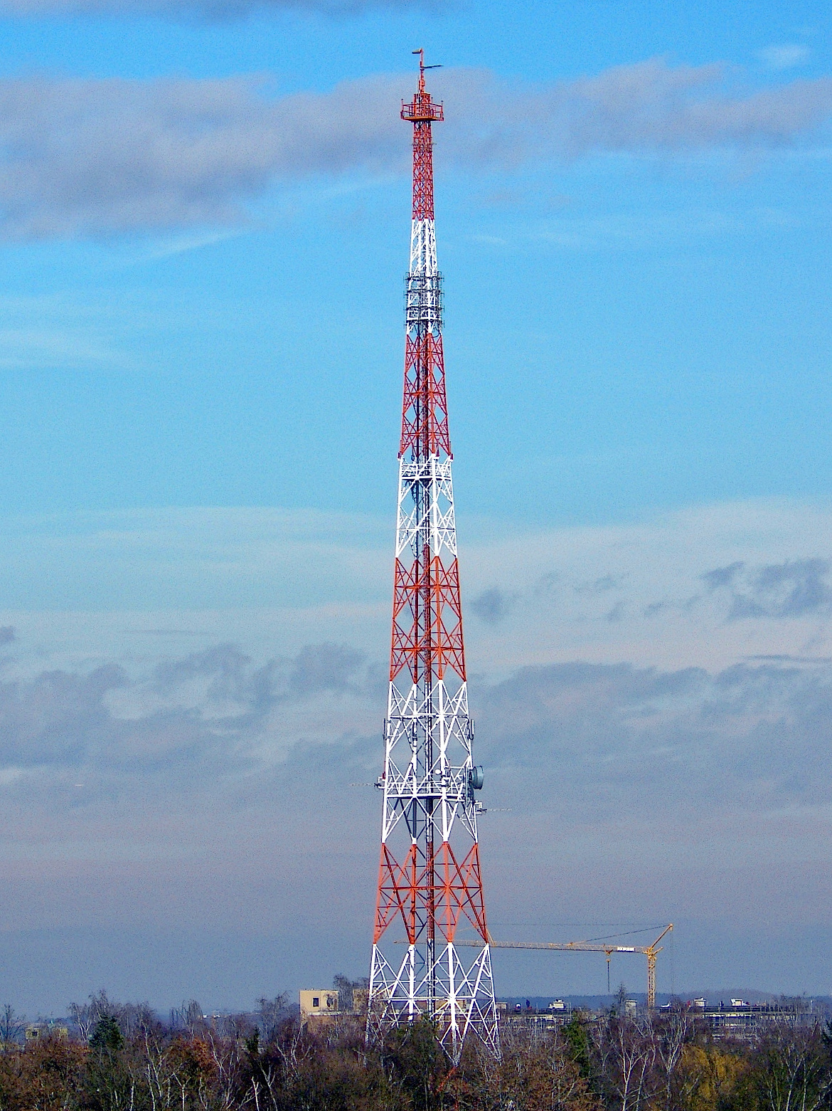 Sendeturm im Studio Franken des Bayerischen Rundfunk. Der 108 Meter hohe Turm in Stahlfachwerkbauweise, dient nur der Programmzuspielung. 49°26′02″N 11°01′39″E / 49.433963192001°N 11.027394266975°E